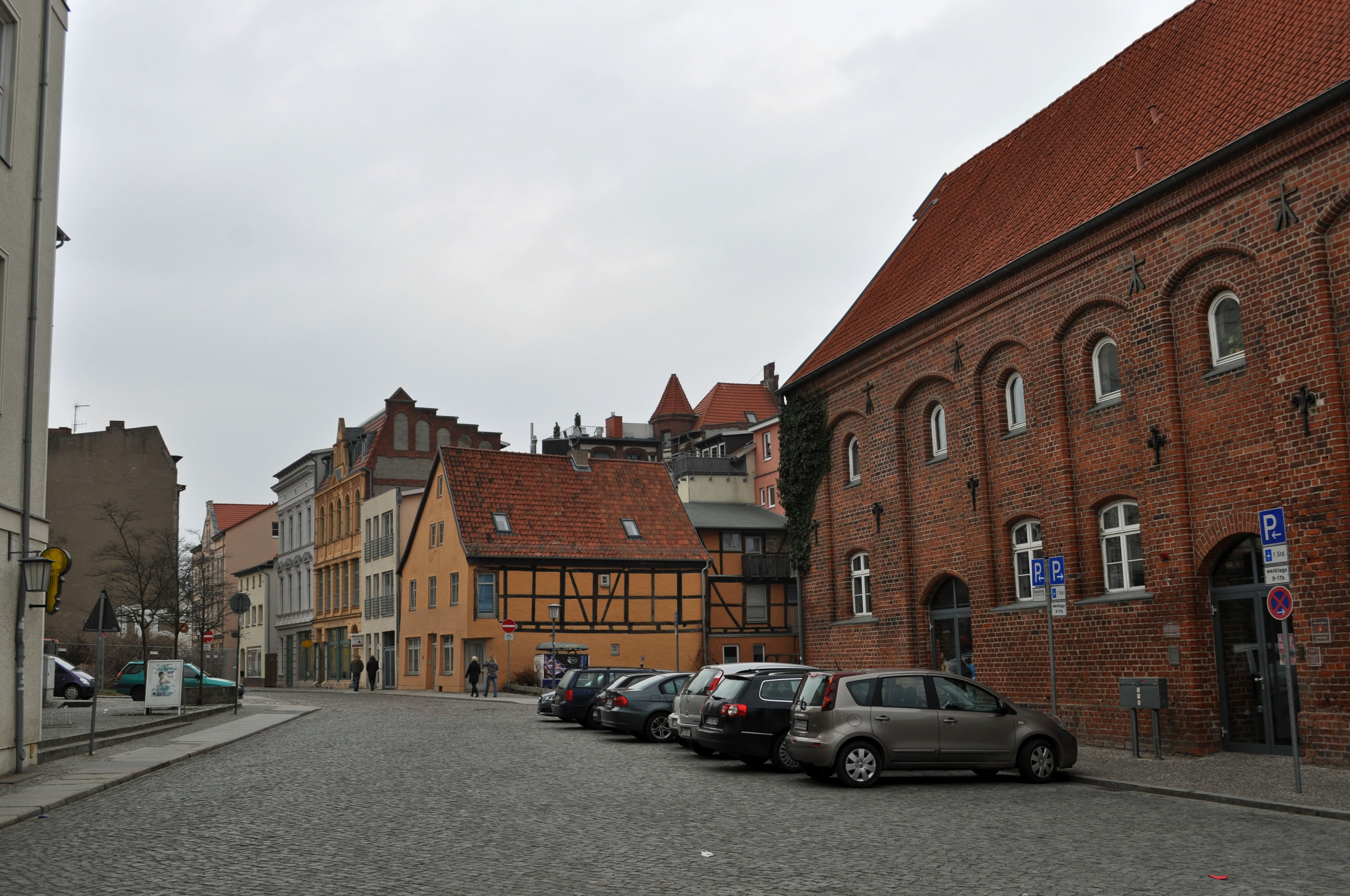 Gebäude bzw. Gebäudedetail in Stralsund. Straße und Hausnummer siehe Dateiname.